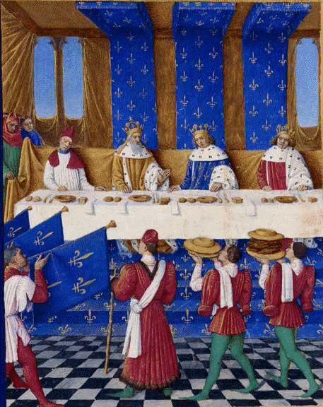 Karel V. hostí Karla IV a Václava IV.